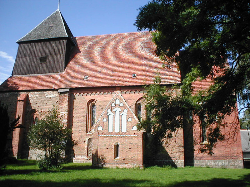 Backsteinkirche in Altkalen mit Wand- und Deckenmalereien aus dem 13. Jhd.